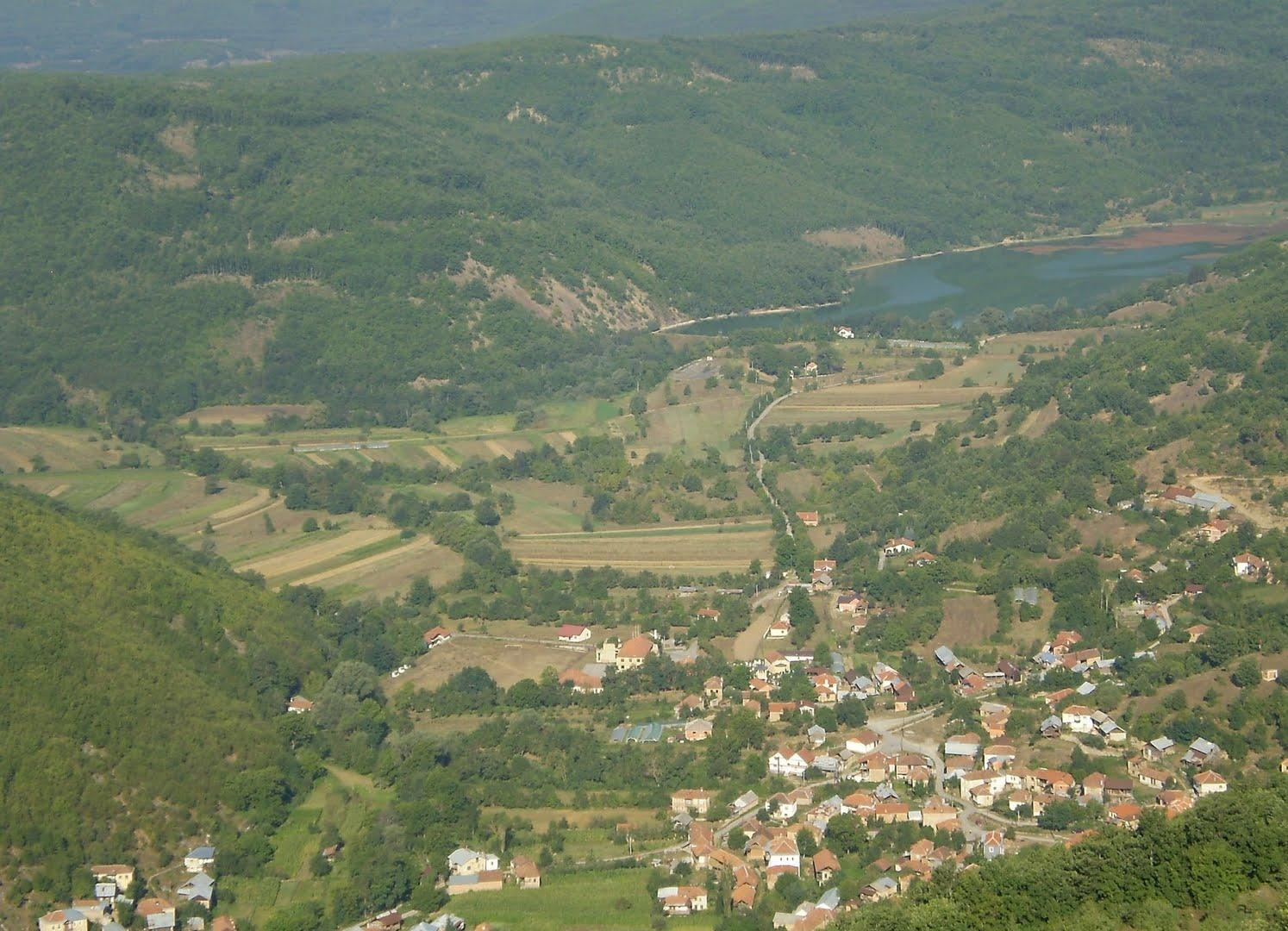 Слатино и Слатинско Езеро